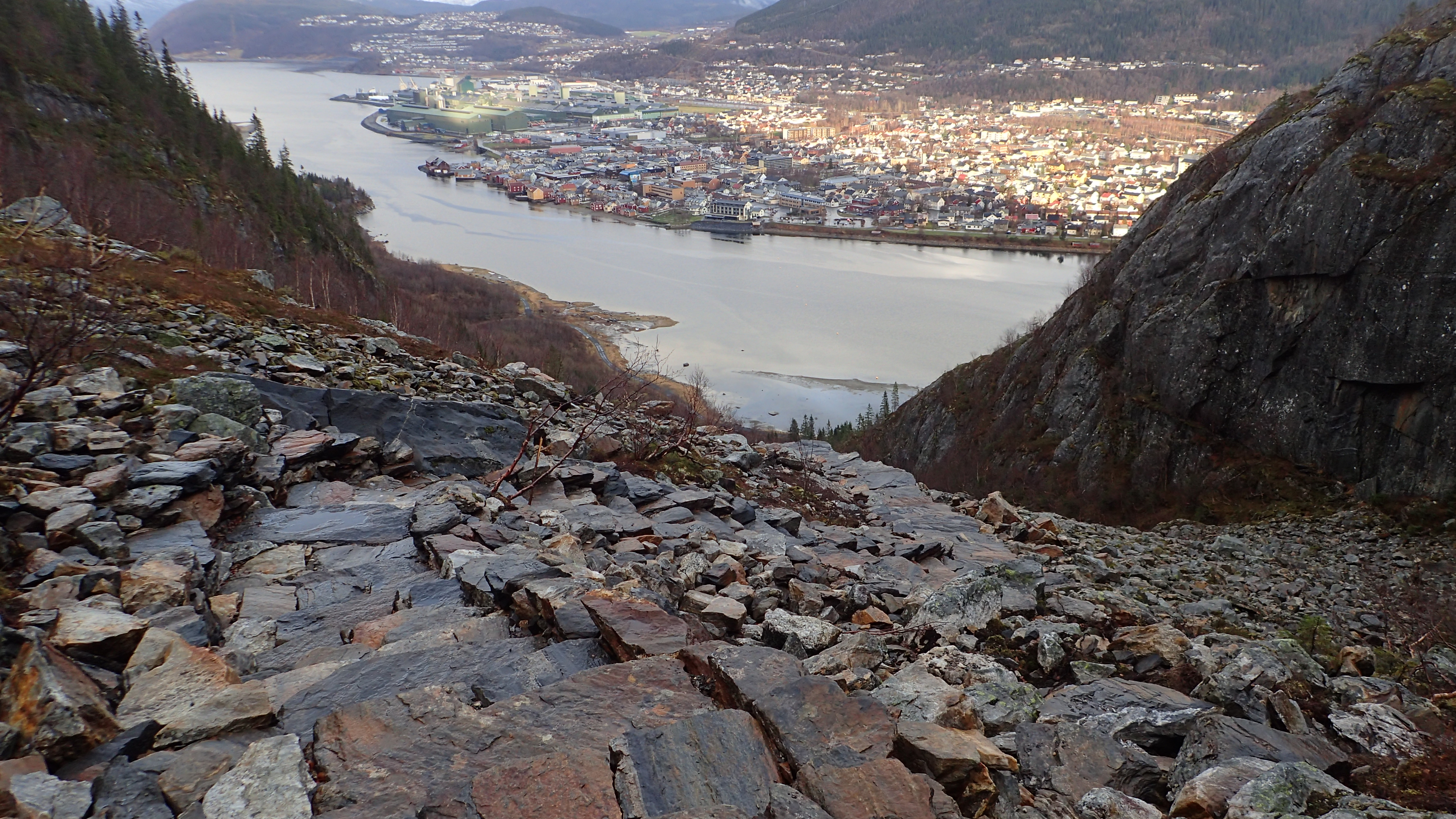 Helgelandstrappa går i sikk sakk opp Øyfjellet.